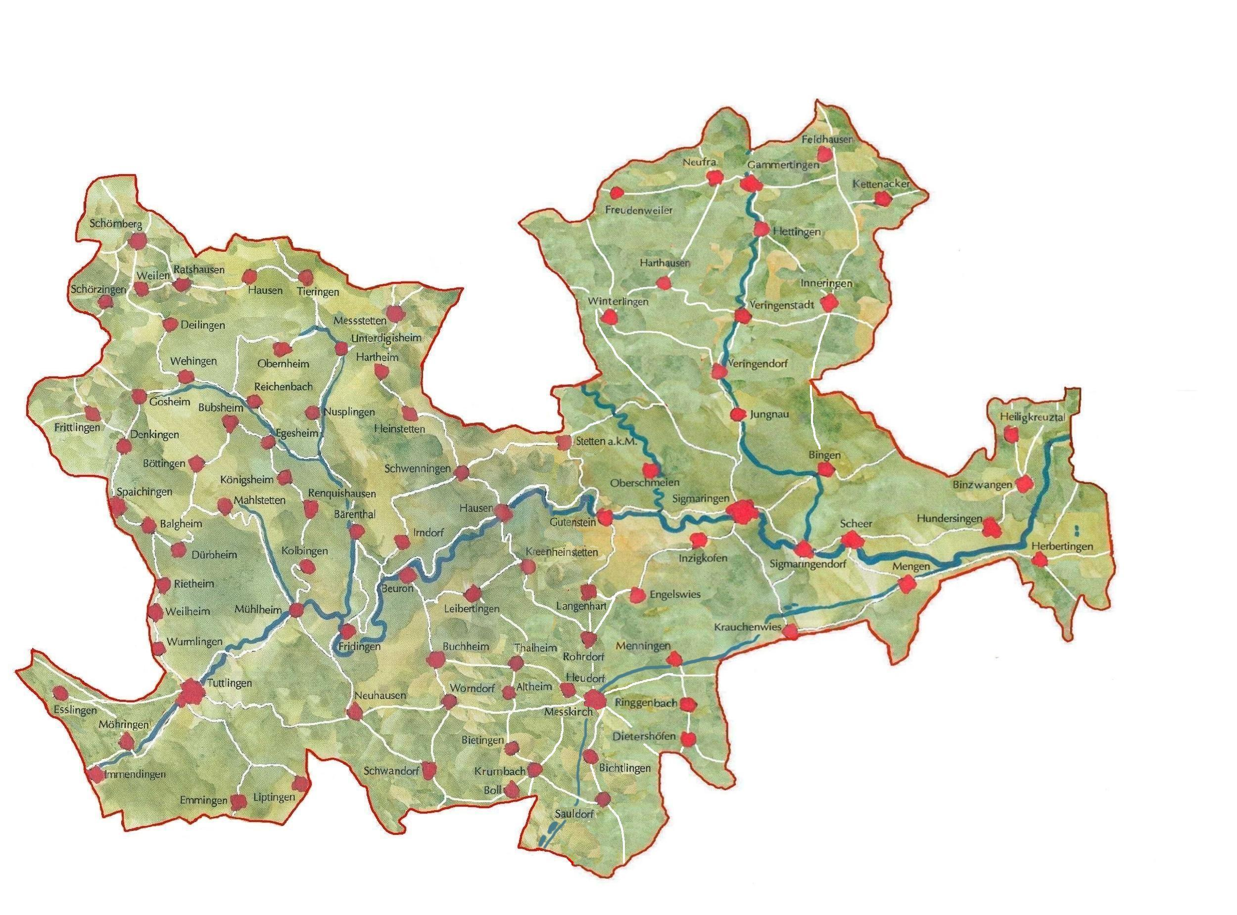 Karte des Naturparks Obere Donau